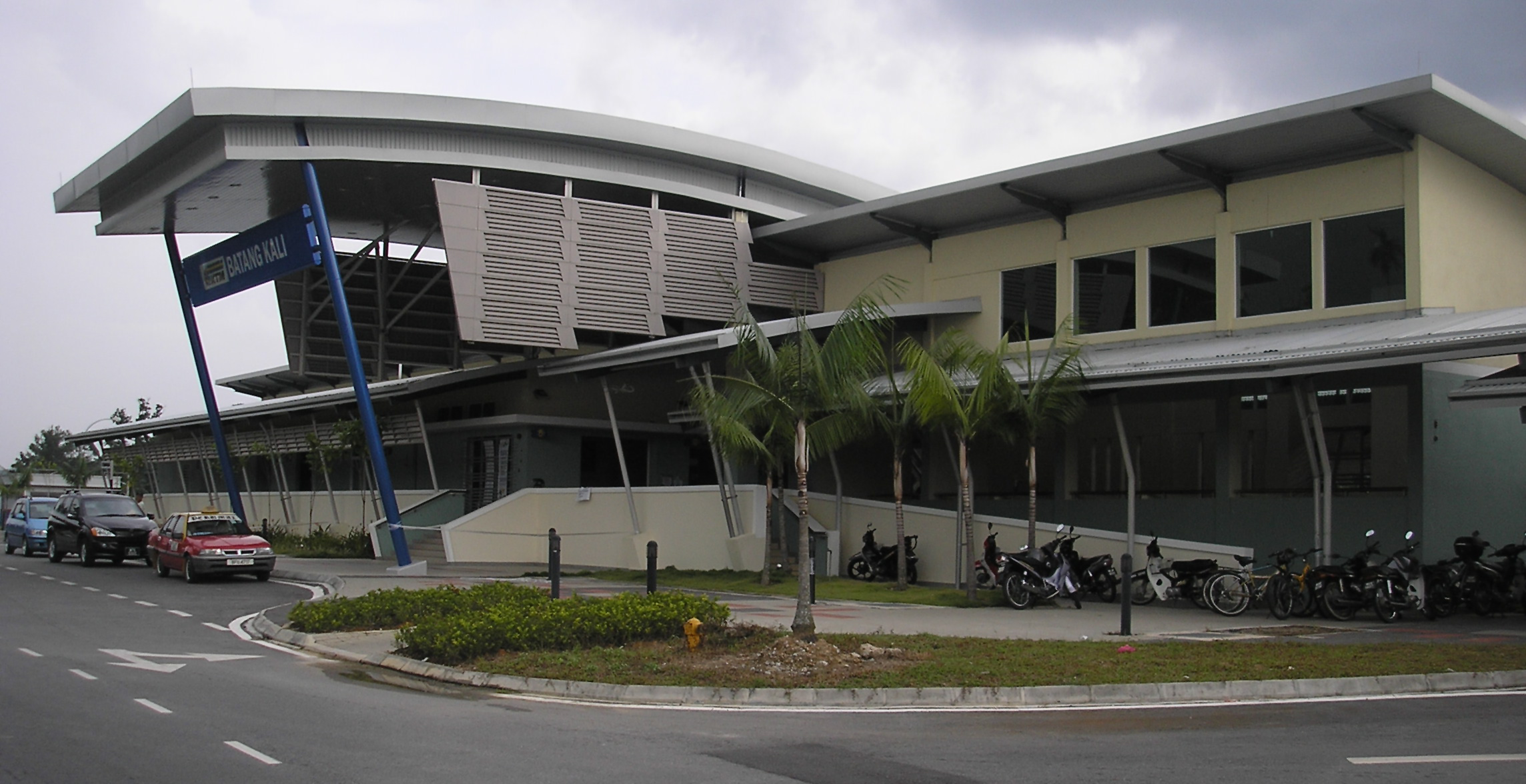 The Batang Kali station (Rasa-Rawang) (exterior), near Batang Kali, Selangor, Malaysia.